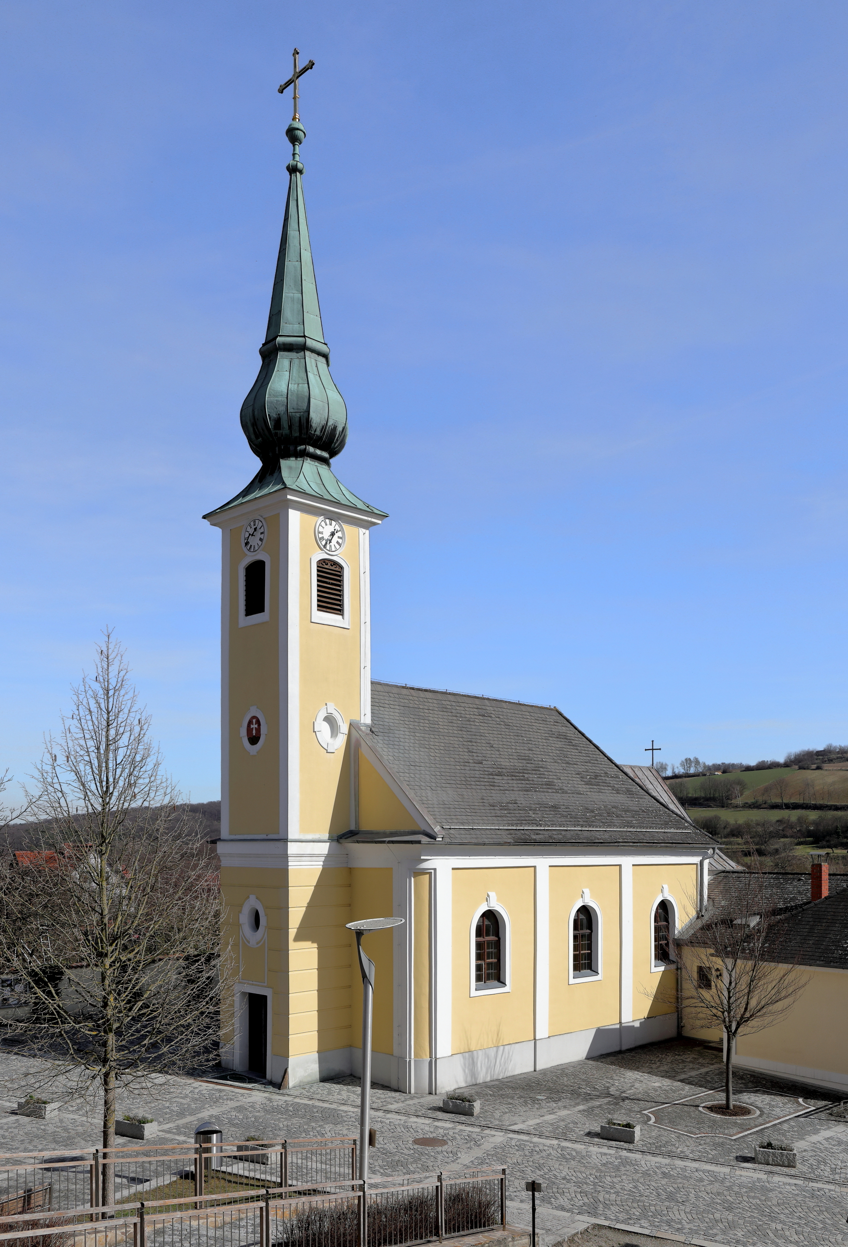 Westansicht der röm.-kath. Pfarrkirche hl. Johannes Nepomuk in Unterbergern, ein Ortsteil der niederösterreichischen Gemeinde Bergern im Dunkelsteinerwald.Eine schlichte josephinische Saalkirche in der Ortsmitte, die 1766 als Kapelle errichtet und nach der Pfarrerhebung von 1784 bis 1785 durch Johann Schwerdtfeger vergrößert wurde. 1868 wurde der Turm um ein Schallgeschoß erhöht und erhielt den heutigen Turmhelm.